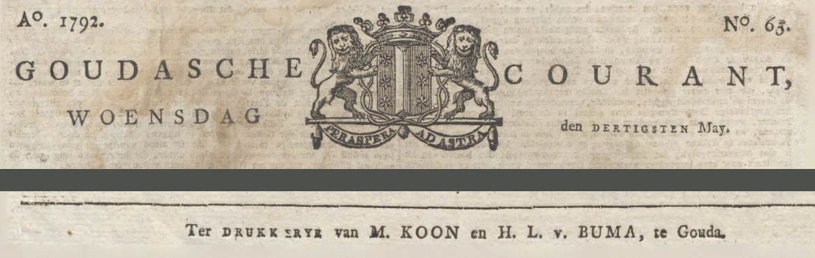 Kop- en voettekst